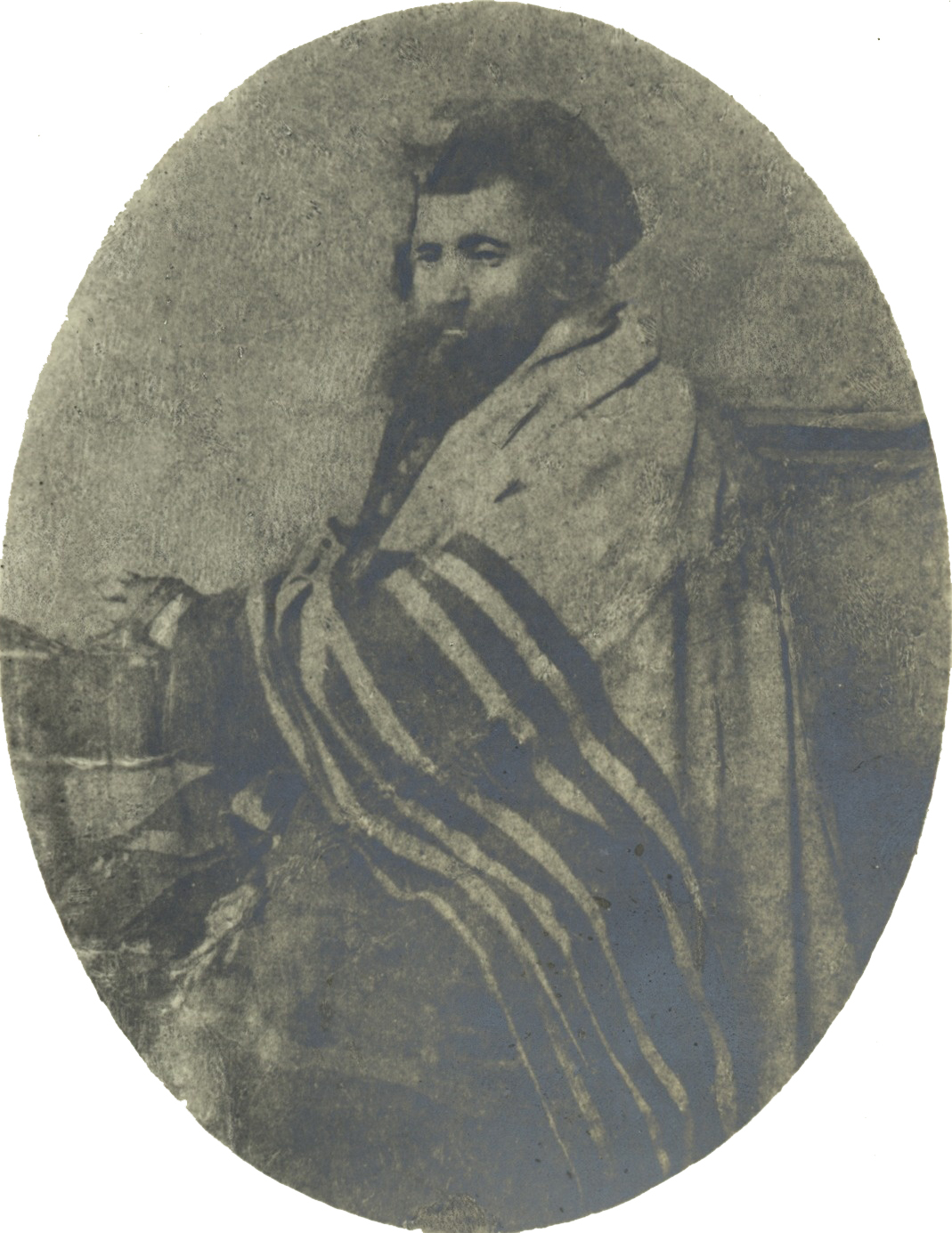 משה זקס